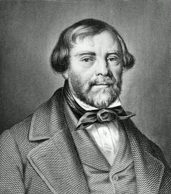 Eugene Sue